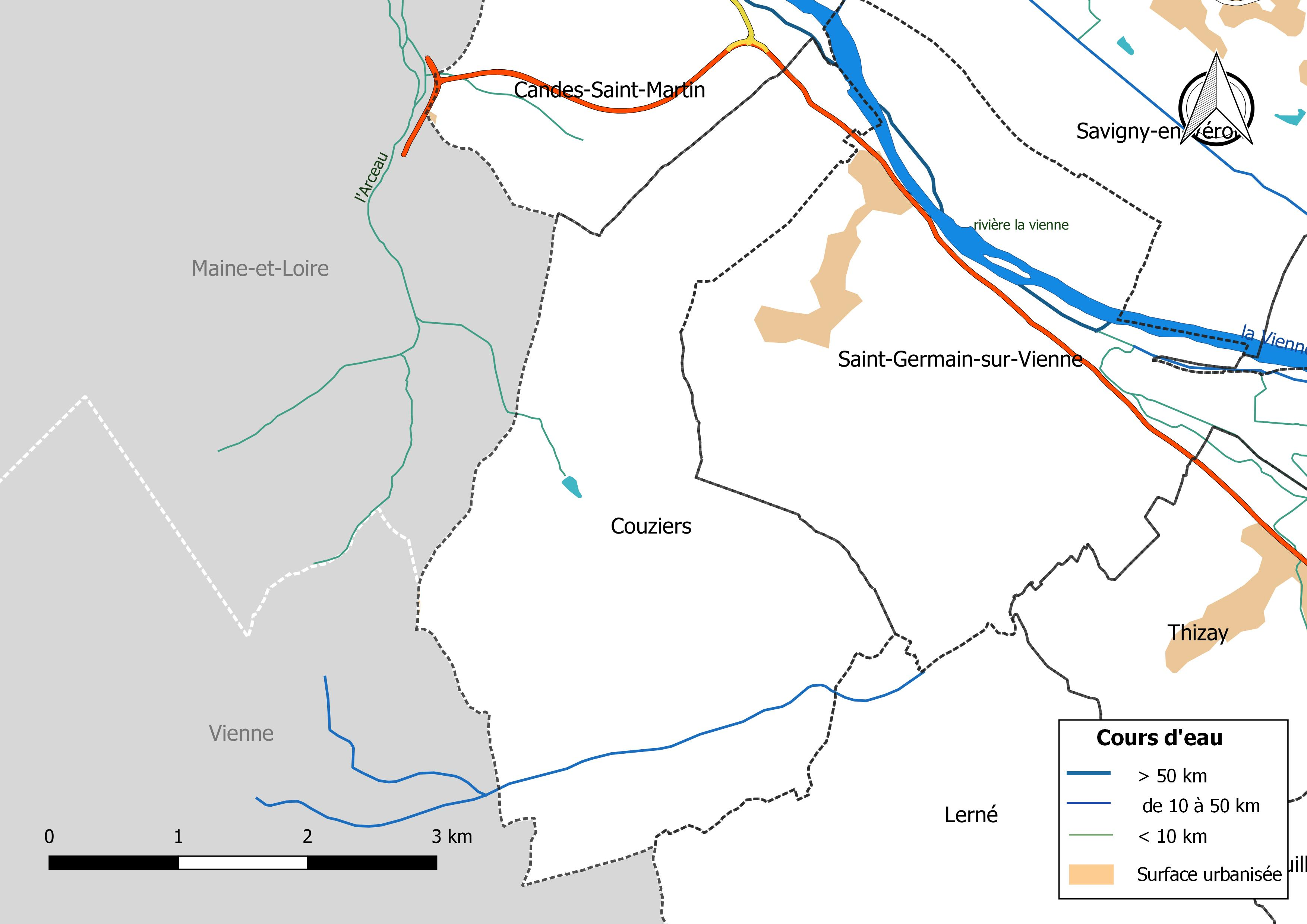 Carte du réseau hydrographique de la commune de Couziers (France).